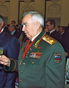 Маршал Советского Союза Виктор Георгиевич Куликов